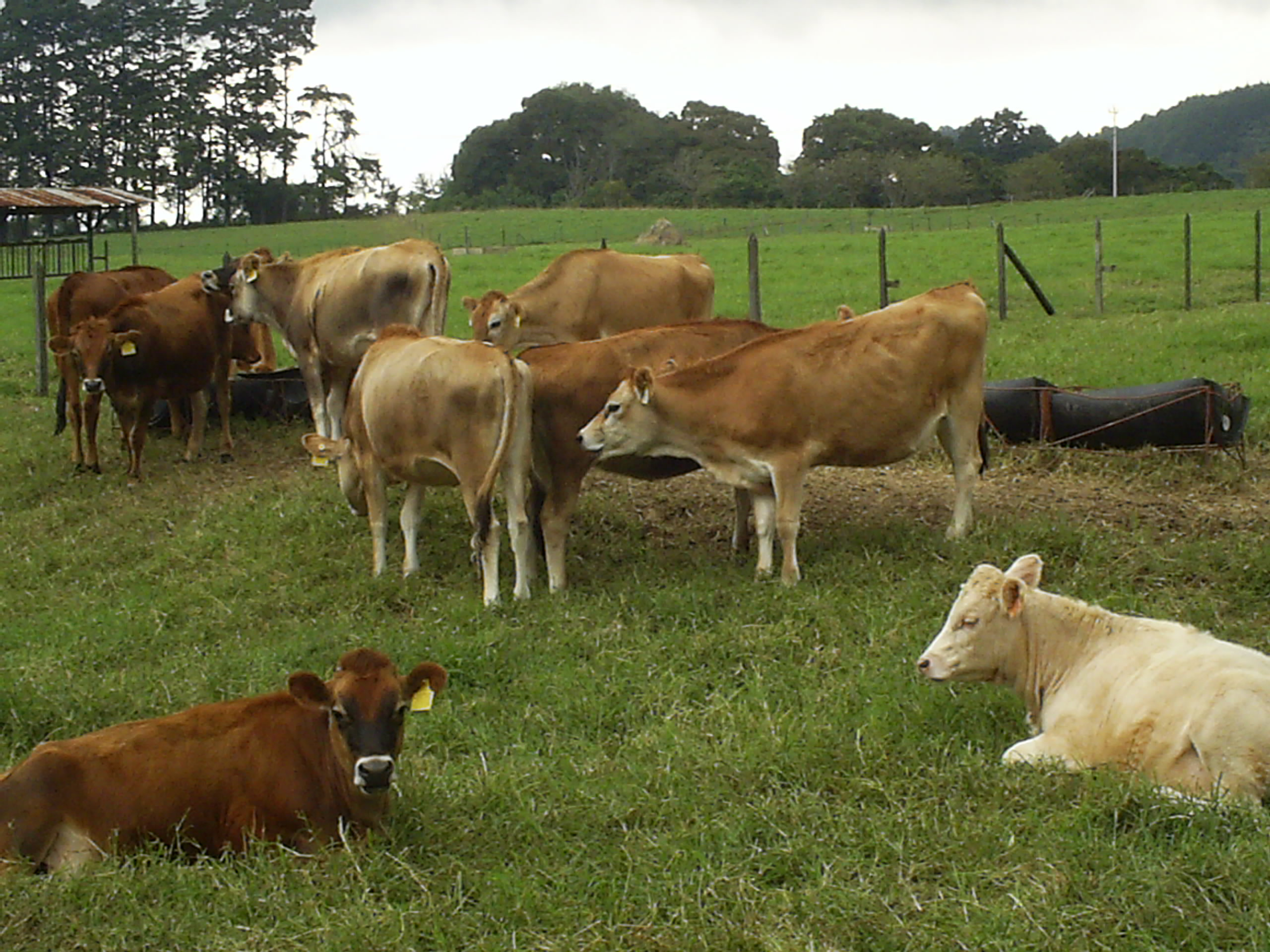 Hato Jersey.